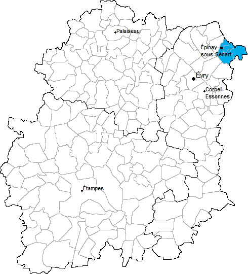 Carte de localisation du canton d'Épinay-sous-Sénart en Essonne (91)